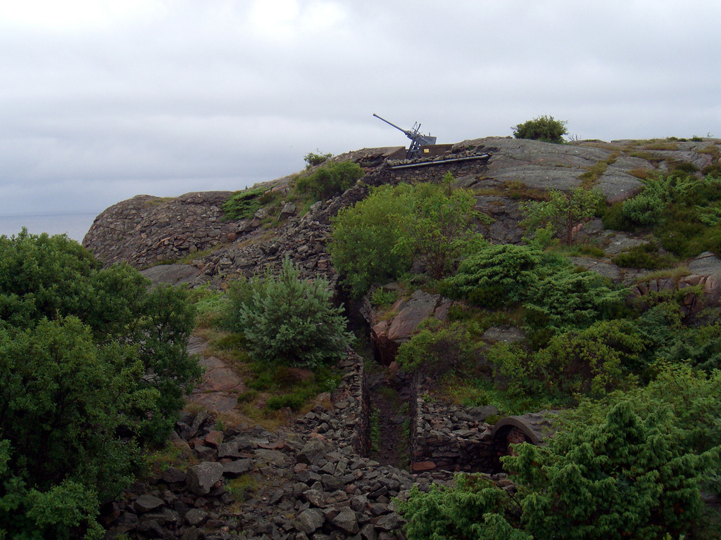 From the German «Festung Norwegen» from WWII - a large system of bunkers, tunnels, cannonposts, lightsweeps at the islands of Ny-Hellesund, Søgne.